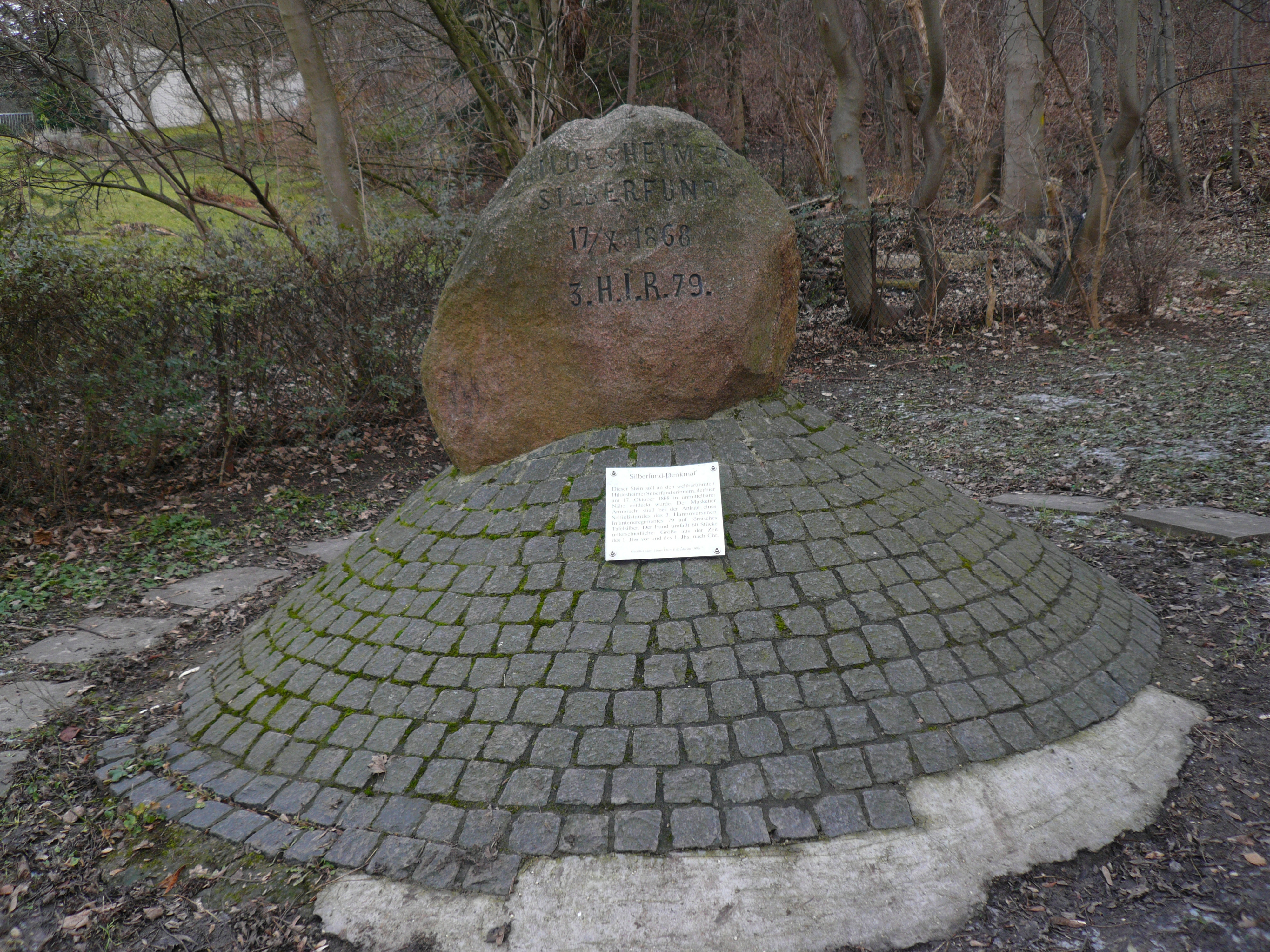 Silberfunddenkmal, a monument in Hildesheim